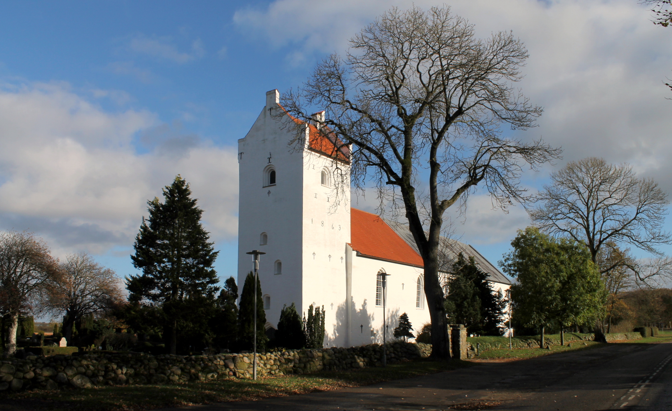 Vrejlev Kirke